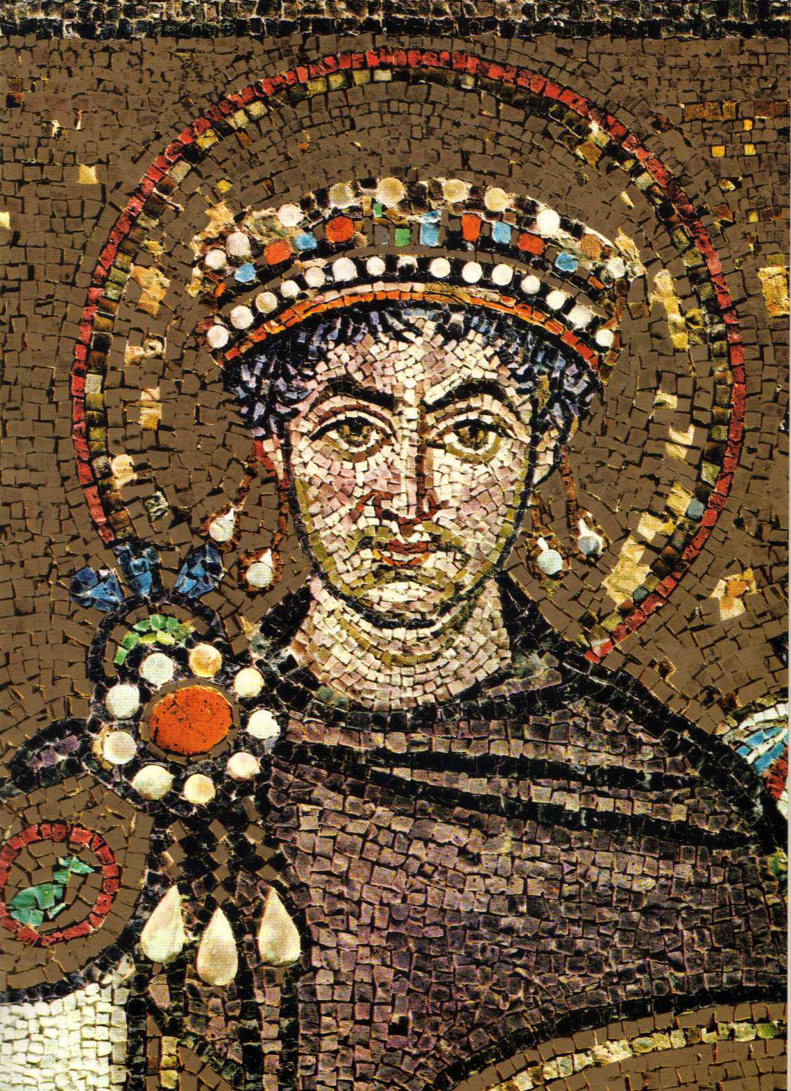 Imperatore Giustiniano I di Bisanzio come raffigurato in San Vitale a Ravenna